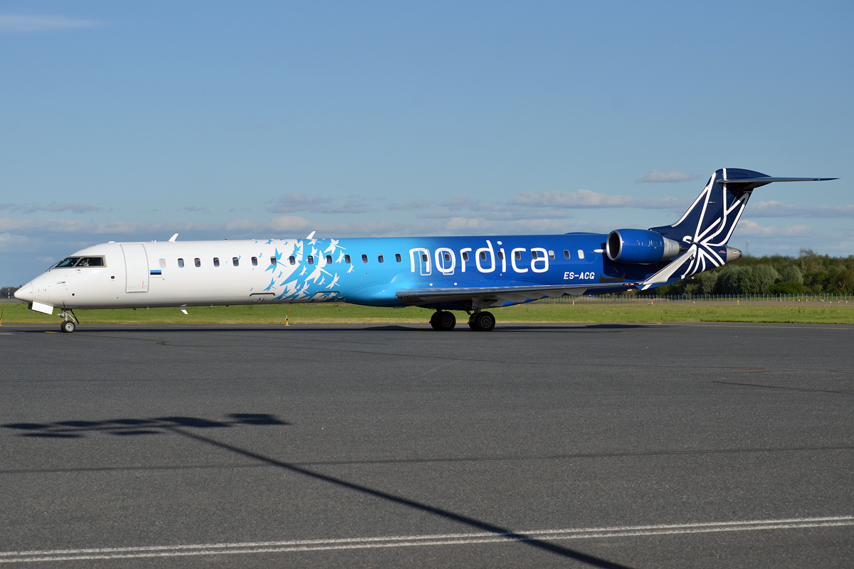 Nordica, ES-ACG, Bombardier CRJ-900LR